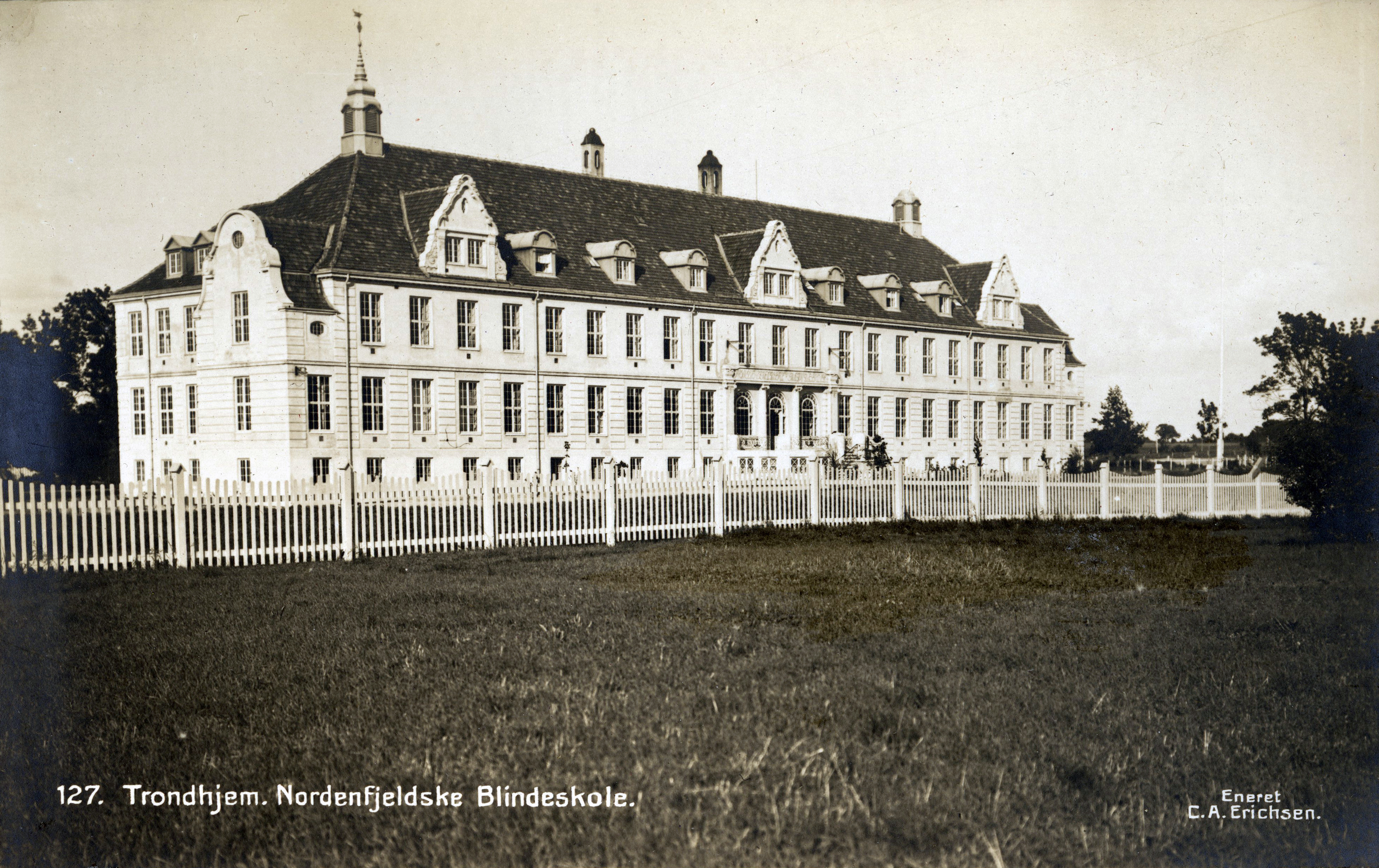 Format: Postkort. År: Tidlig 1900-tall, ca. 1910 - 1915. Om fotografen: ERICHSEN, C. A. - Drøbak og Bodø ca. 1910. Ett av hans bilder datert 1910 er med i Drøbakboken, og han har fotografert landskaper og brevkort i Bodø omtrent samtidig. Hentet fra Bonge, Susanne: Eldre norske fotografer. Fotografer og amatørfotografer i Norge frem til 1920 (Universitetsbiblioteket i Bergen)